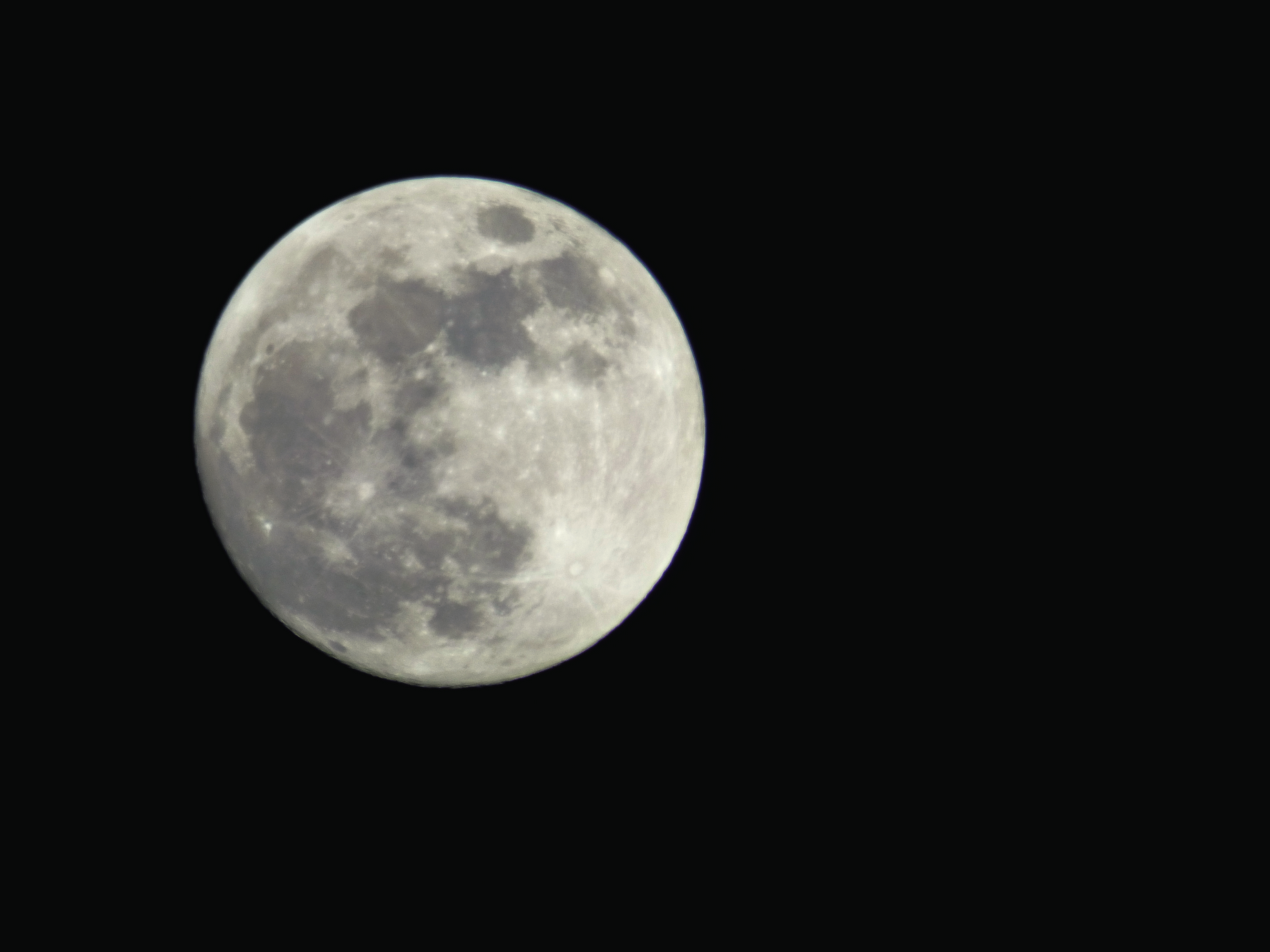 2018-01-30eko super Ilargia eta Ilargi urdina